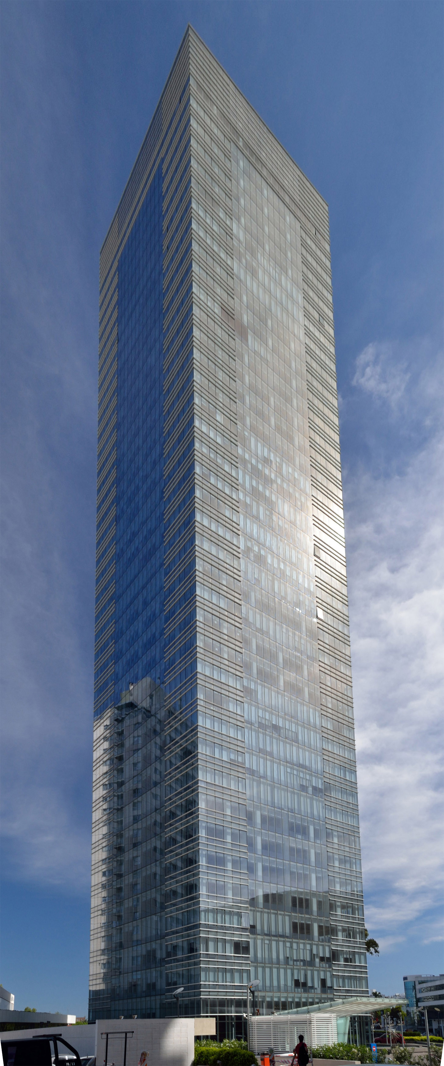 Torre IV